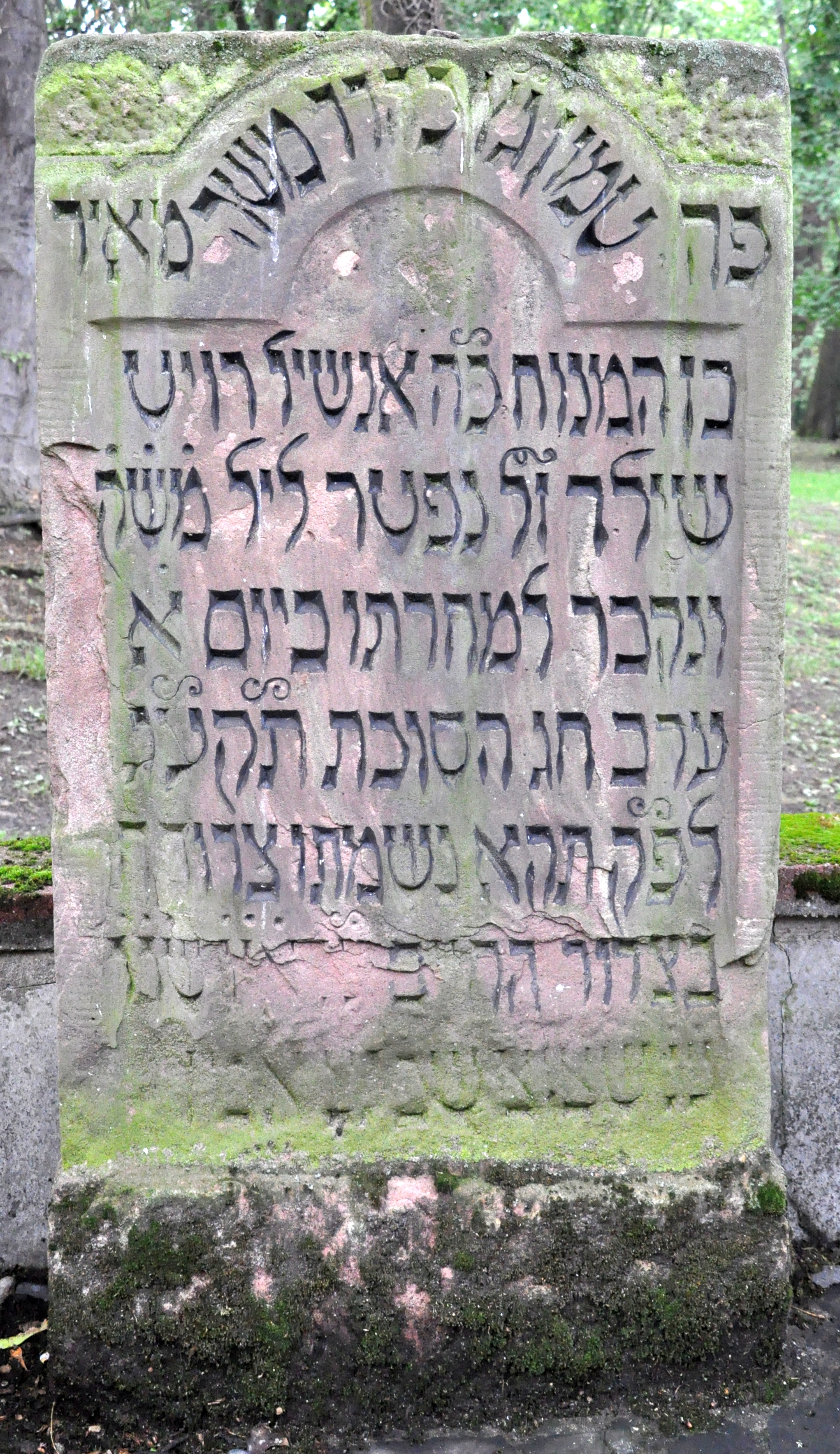 Grabstein für Mayer Amschel Rothschild (1744-1812) auf dem alten jüdischen Friedhof (Friedhof Battonnstraße) in Frankfurt am Main Der Text lautet übersetzt: Der geehrte Herr Meir Rothschild 573 Hier ist geborgen der Spendeneinnehmer, der geehrte Meister, Herr Mosche Meir, Sohn des Seligen, des geehrten Herrn Amschel Rothschild, sein Andenken zum Segen, verschieden in der Nacht des Ausgangs des heiligen Schabbat und begraben am Tag darauf, am Tag 1, Vorabend des Laubhüttenfestes, 573 nach kleiner Zählung. Seine Seele sei eingebunden in das Bündel des Lebens mit den Seelen von Awraham, Jizchak und Jaakow, Sara, Riwka und Rachel, mit den Seelen der übrigen gerechten Männer und Frauen, die im Garten Eden. Amen